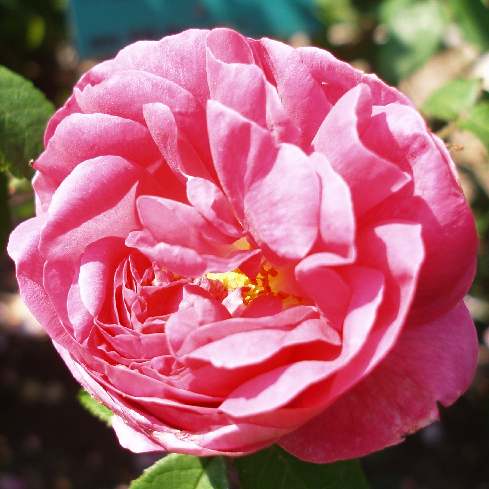 Rosa "Président de Sèze" (Mme Hébert vers 1828) "Gallicanae" roseraie du jardin des Plantes de Paris (Vème)